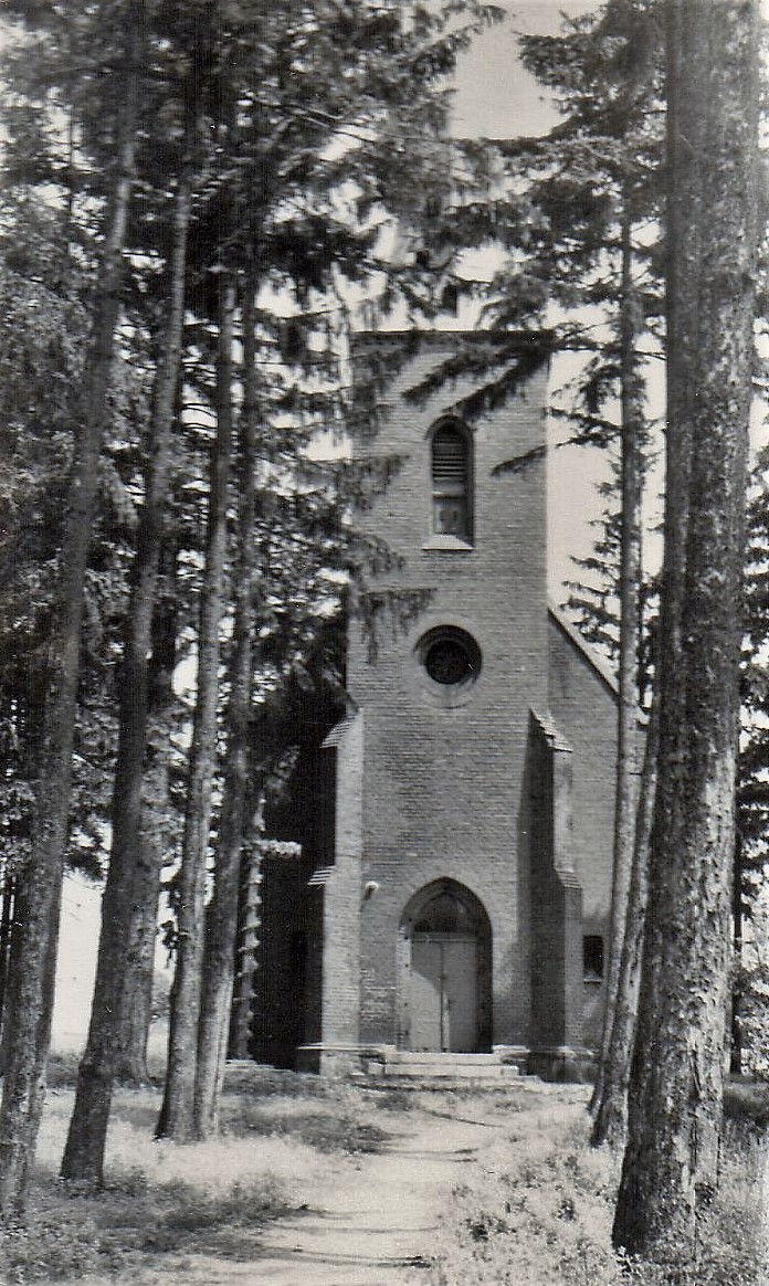 Kępa (Kappe), Kirche (1971)